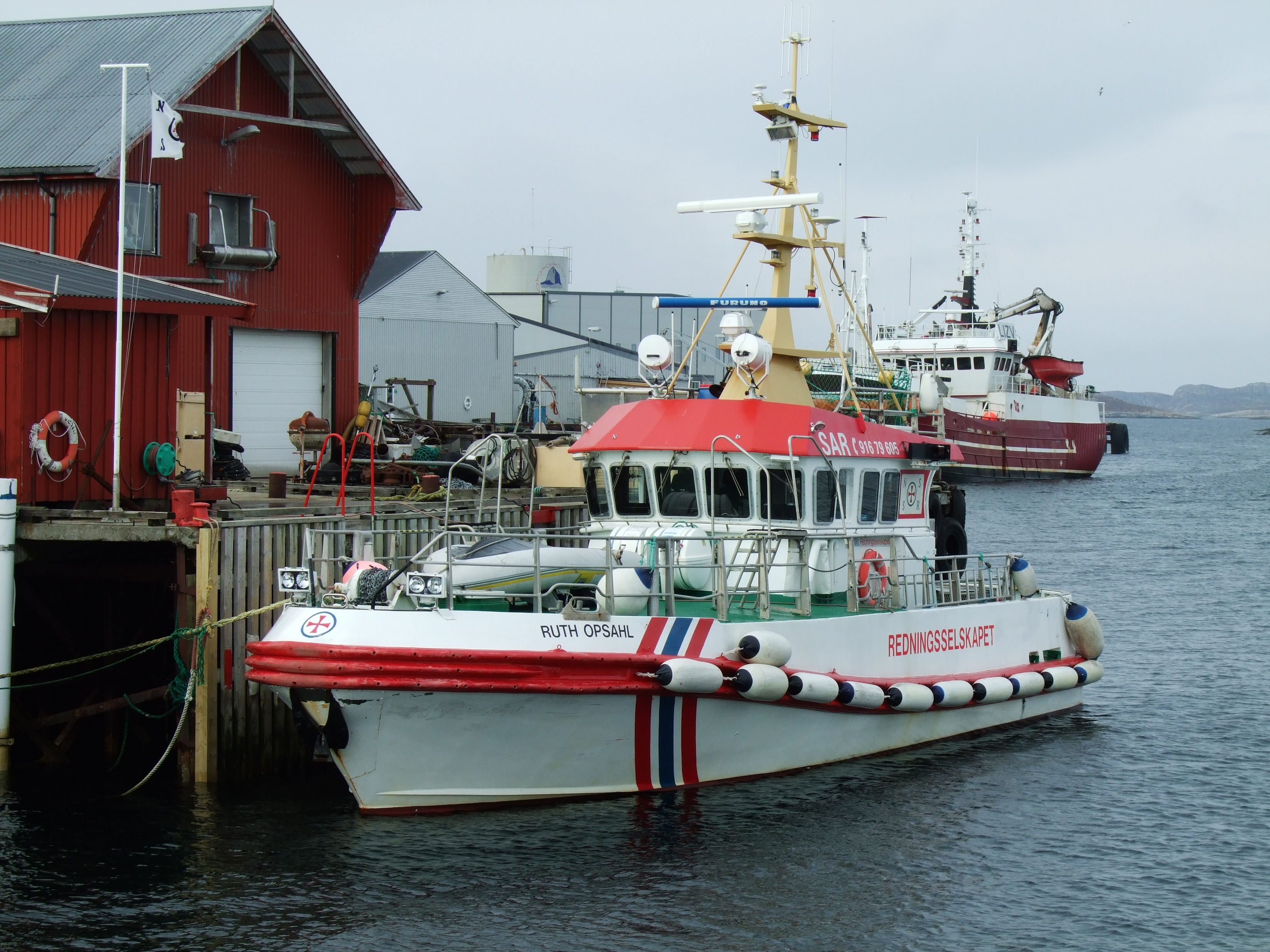 RS «Ruth Opsahl» ved kai på Husøya i Træna